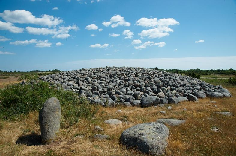 Gammal färdväg med Gösslunda rör i mitten av bilden. Motiv: Hulterstad Nyckelord: Världsarv Kategori: Röse, Färdväg Gammal färdväg med Gösslunda rör i mitten av bilden.